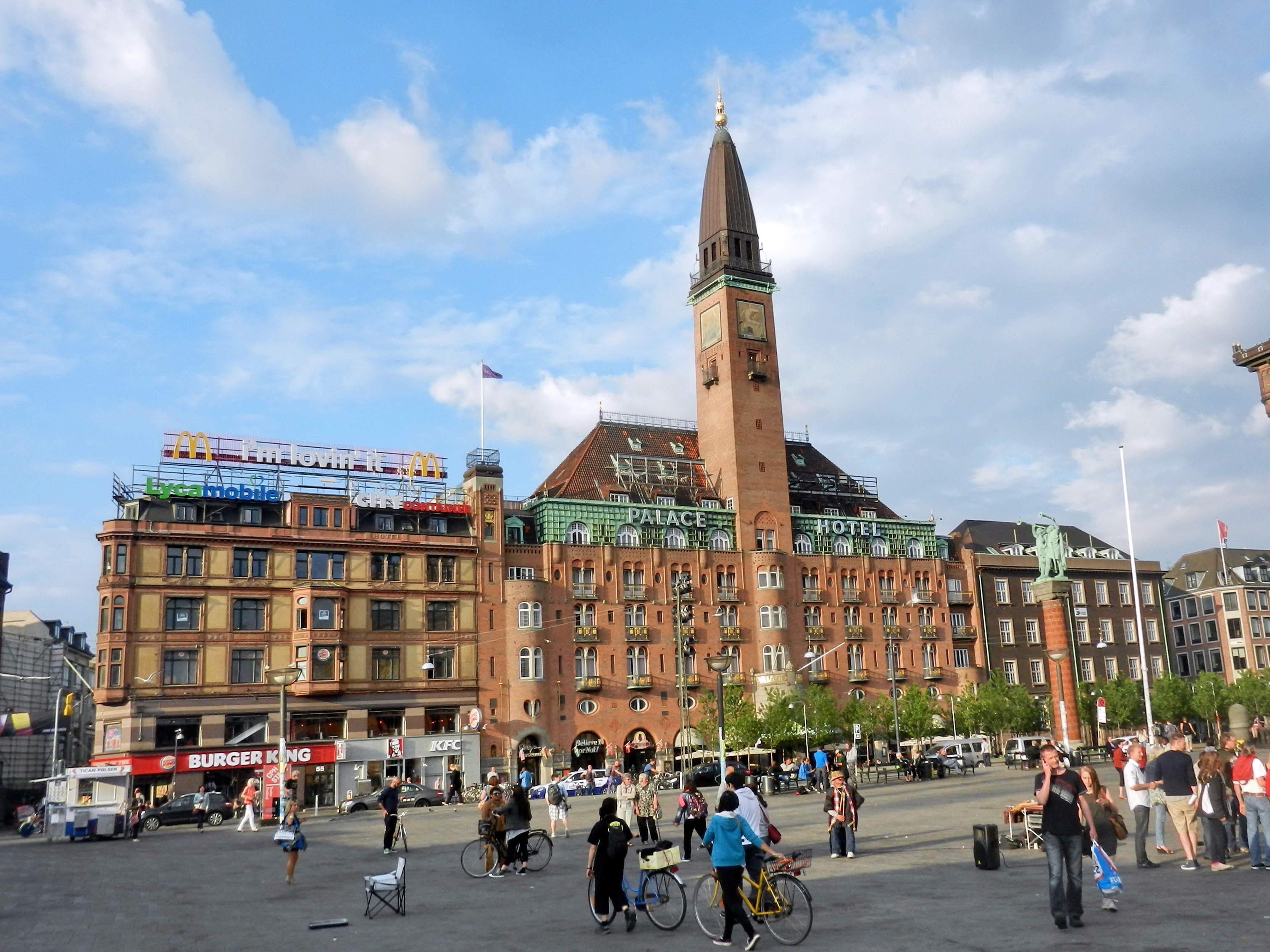 Kopenhagen